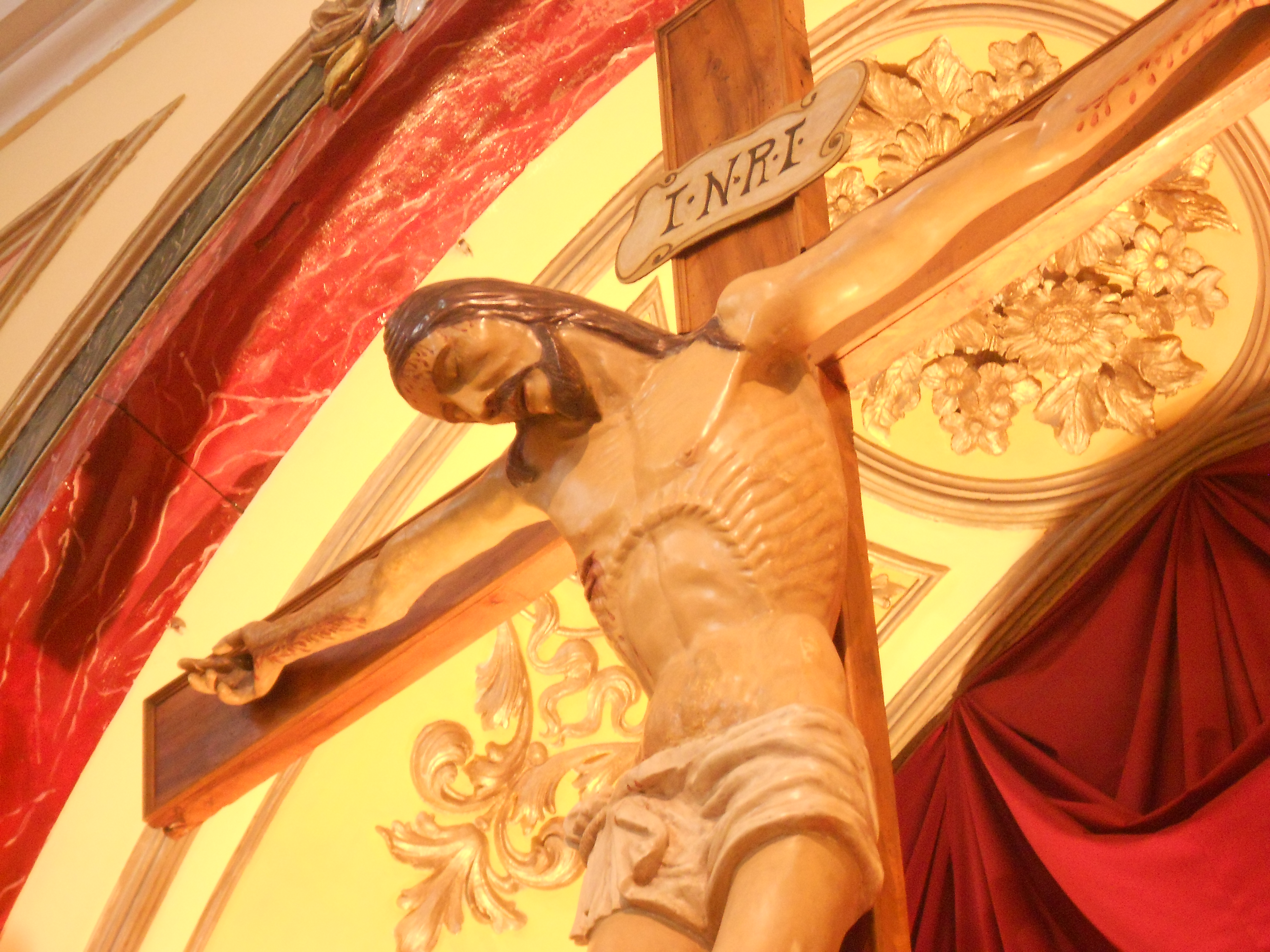 Particolare del Crocifisso ligneo, titolare della parrocchia, del secolo XIII